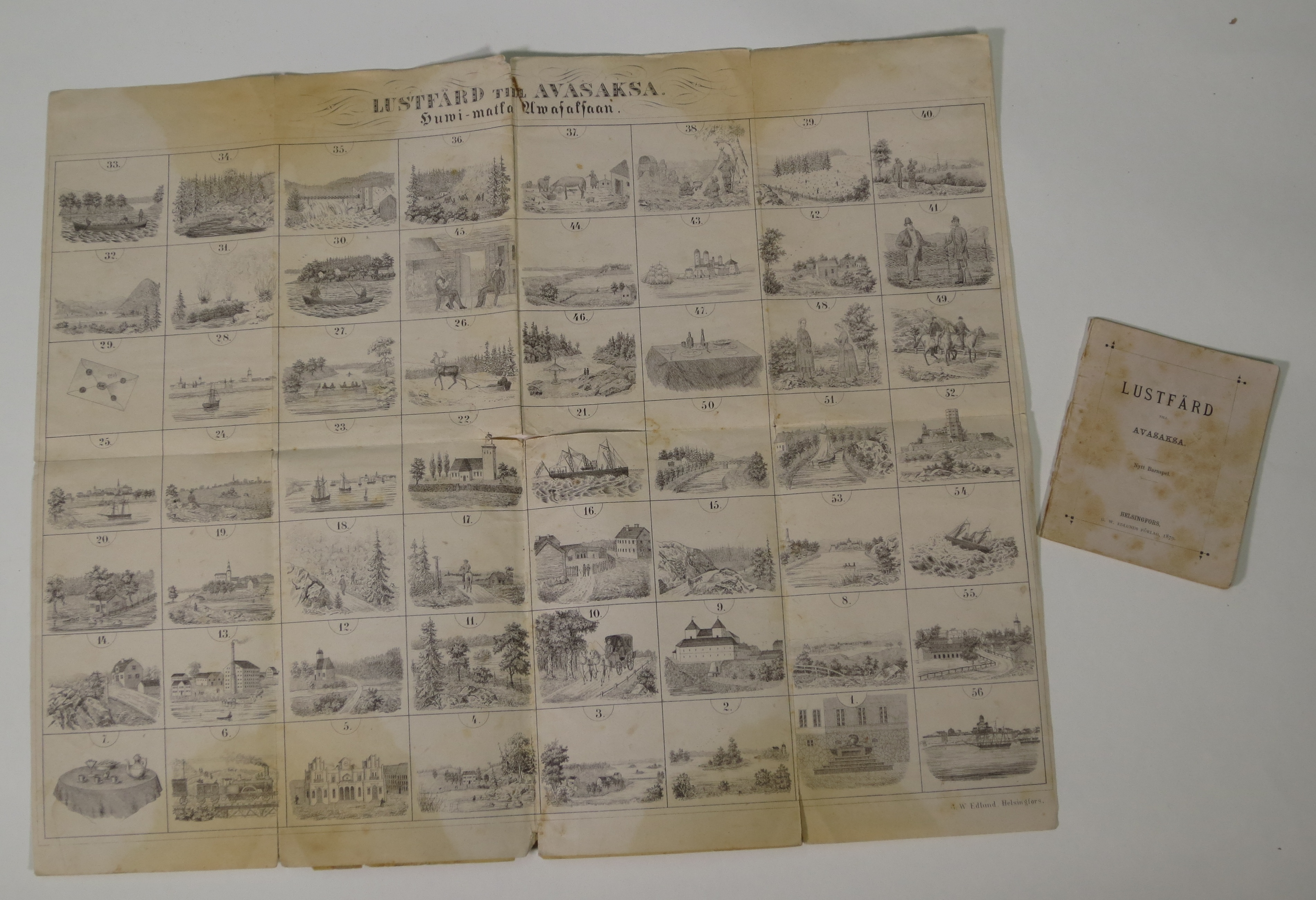 Pelin "Huvimatka Aavasaksaan" pelilauta ja ohjeet. Peli on vuodelta 1862, joten tekijänoikeudet ovat vanhentuneet.